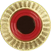 Kokarde für die Dienstmütze der Bundeswehr für Dienstmützen Beschreibung: Die Kokarde von innen nach außen in den Bundesfarben Schwarz-Rot-Gold Trageweise: Kokardenmittelpunkt 3 cm unter dem oberen Rand Maße: Durchmesser: Ausführung: Metall